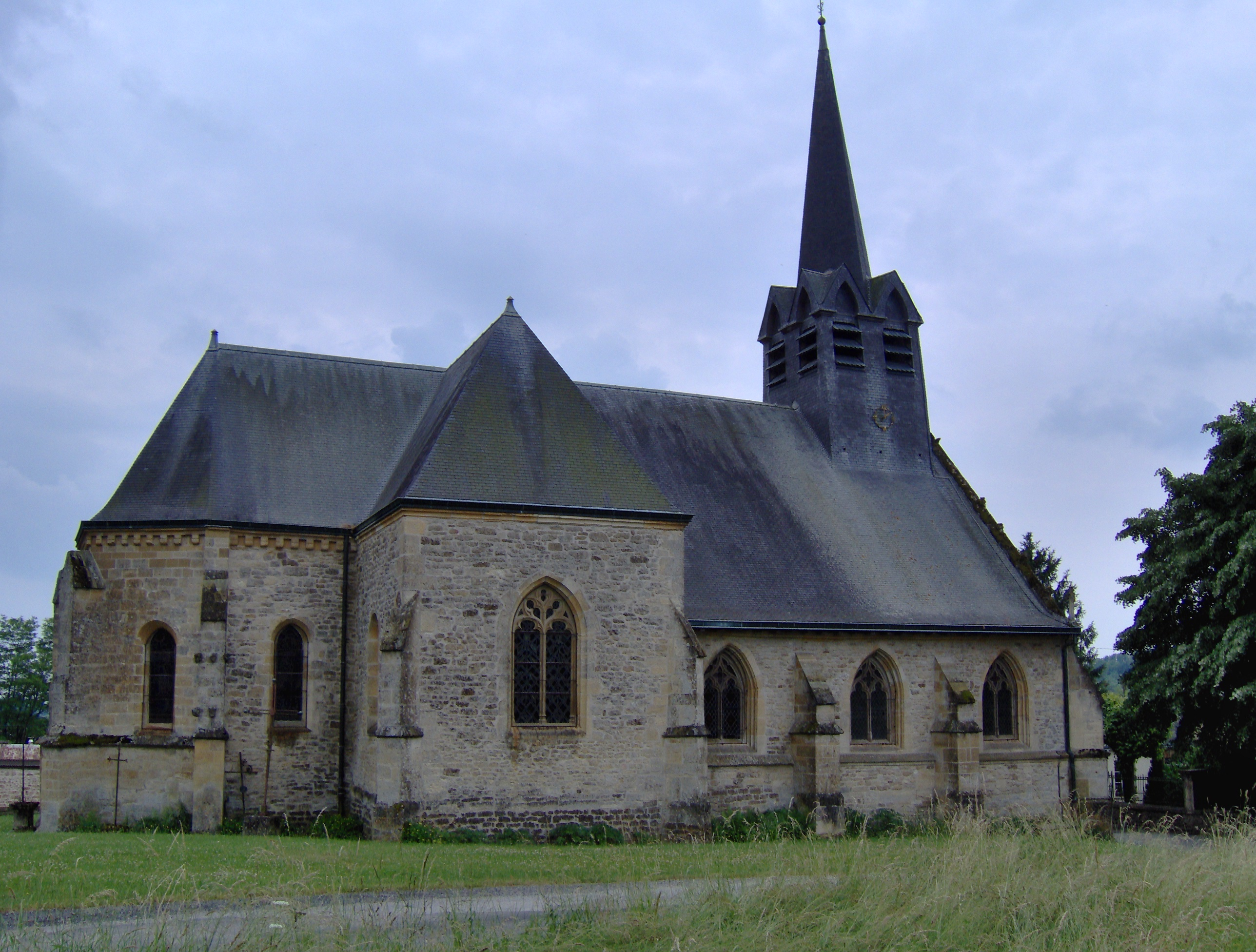 Eglise de Tourteron (Ardennes, France)